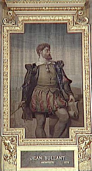 Portrait tissé Jean Bullant (1520-1578)